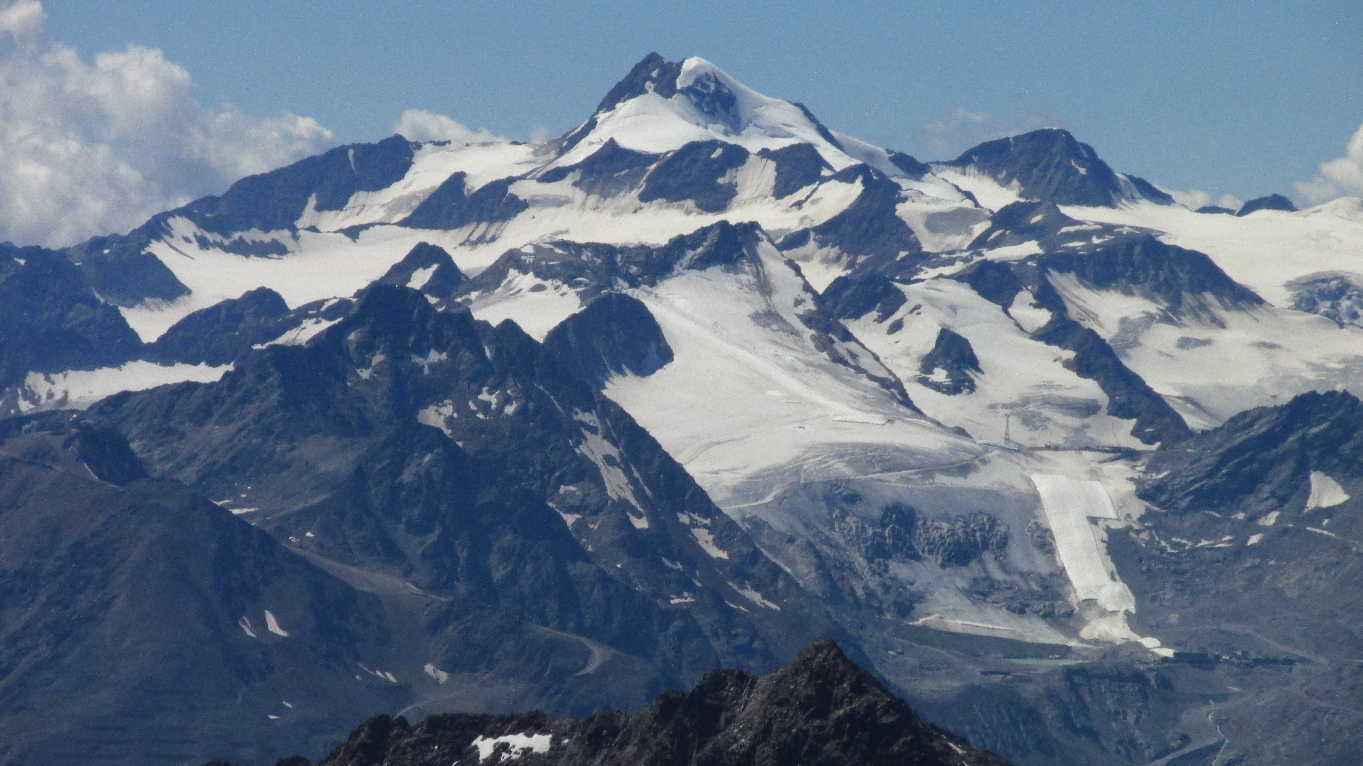 Grotesker Kampf gegen die selbst mitverursachte Klimaerwärmung: Eine Piste auf dem Rettenbachferner ist im Sommer 2020 mit Lappen abgedeckt.